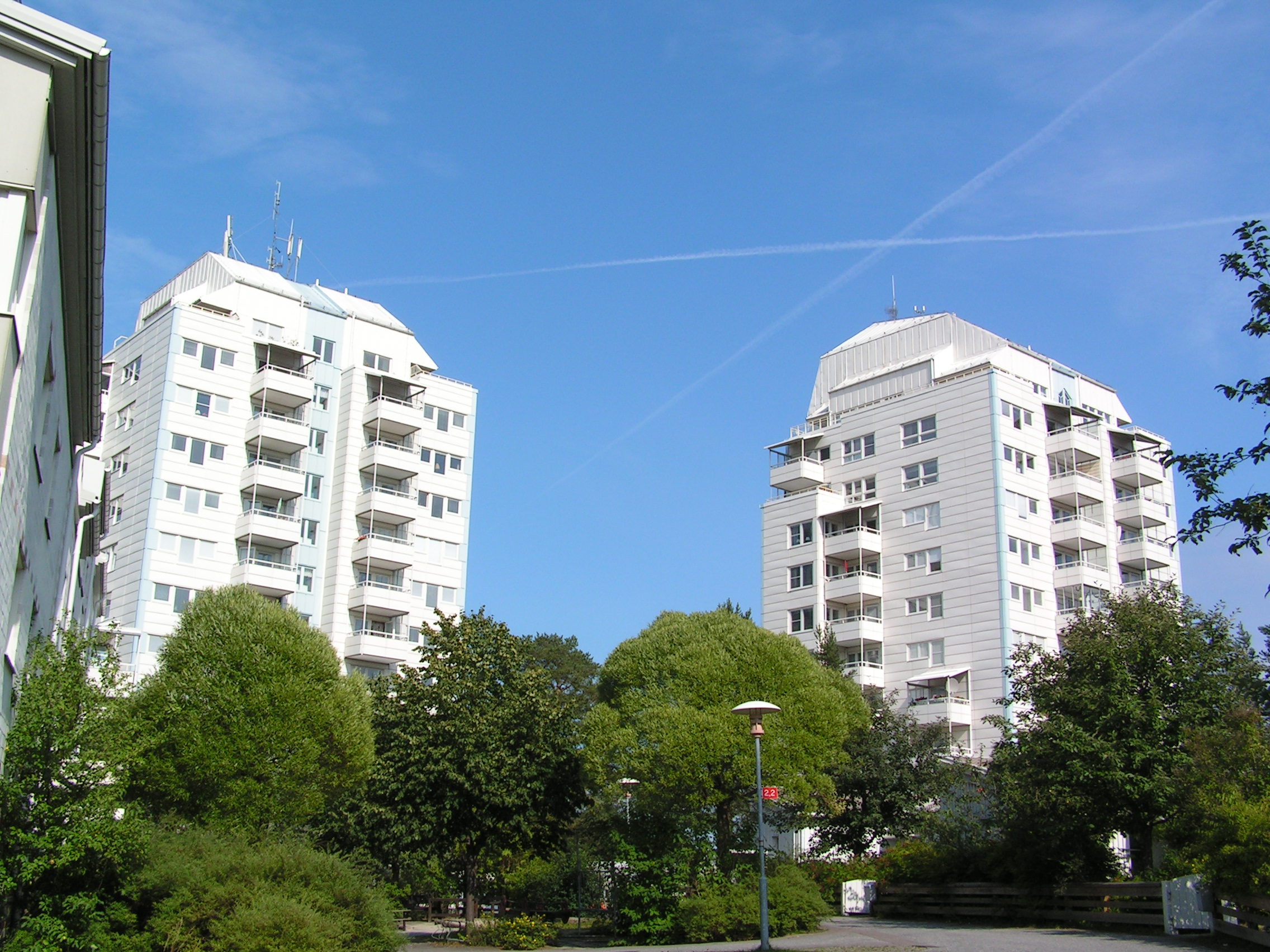 Sandahöjd, Umeå, Sweden